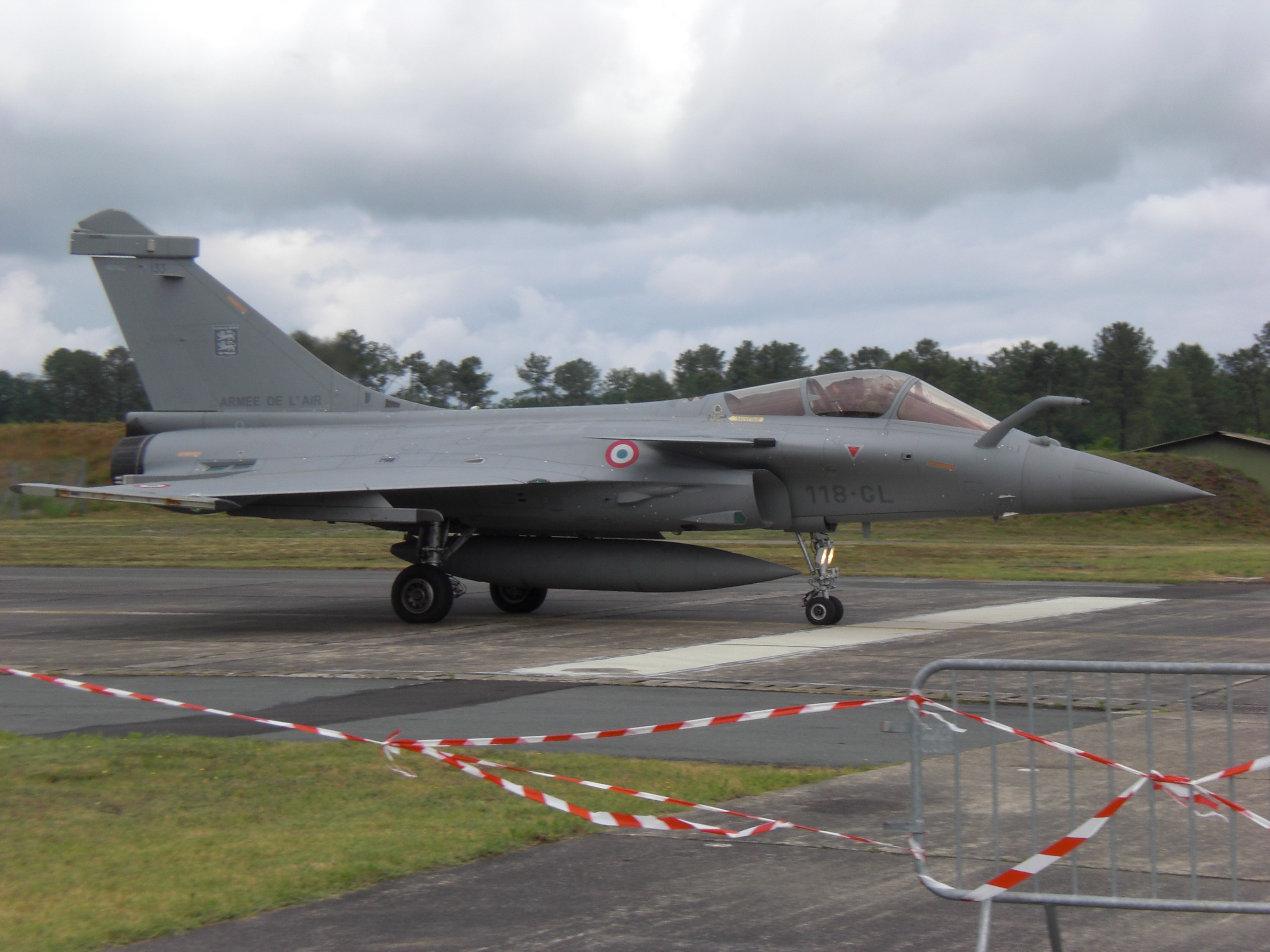 Dassault Rafale F3 de l'escadron de chasse 2/30 Normandie-Niemen exposé lors du meeting aérien de la Base aérienne 118 Mont-de-Marsan